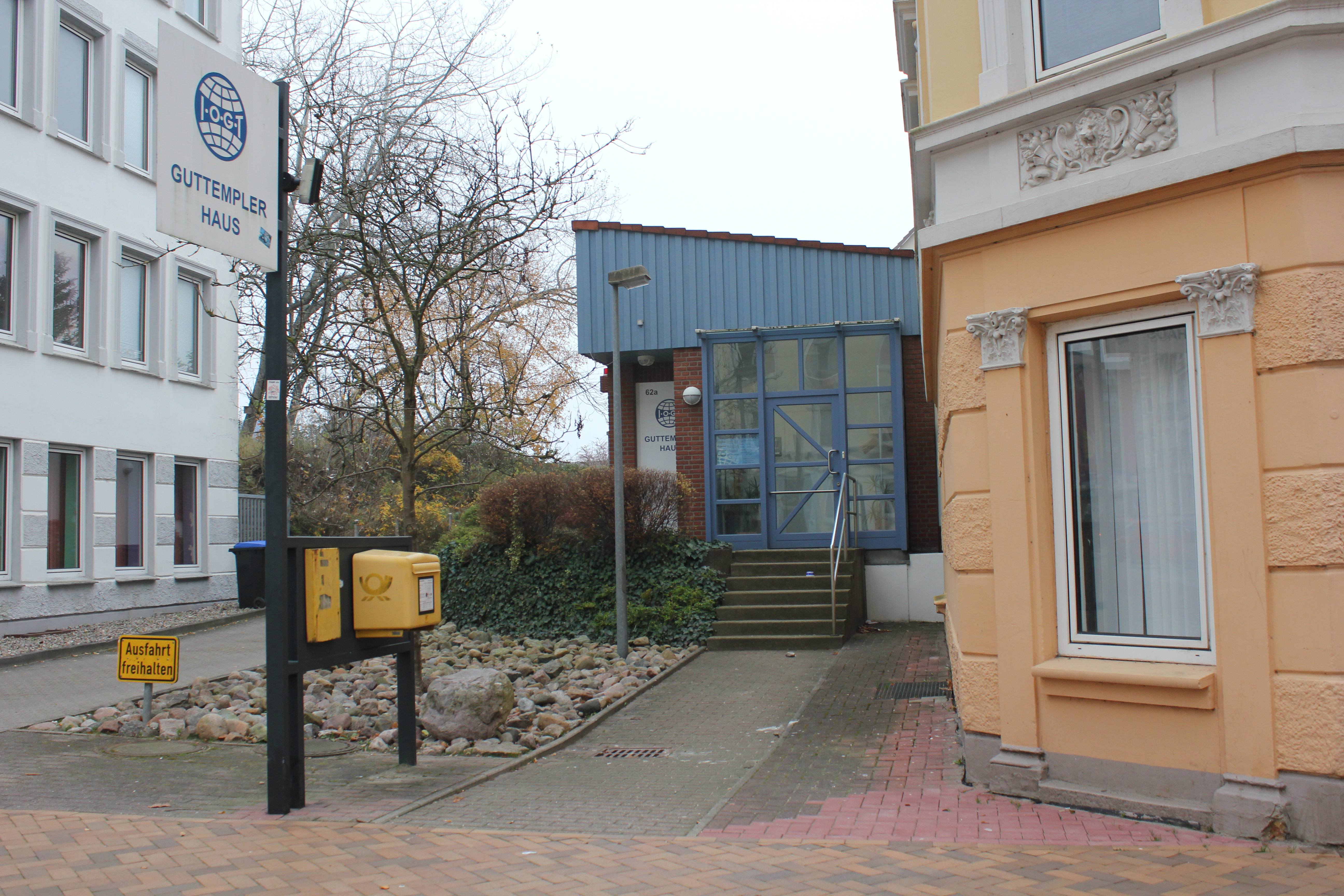 Guttempler Haus, Apenrader Straße 62a (Flensburg 2011-11-06), Bild 05